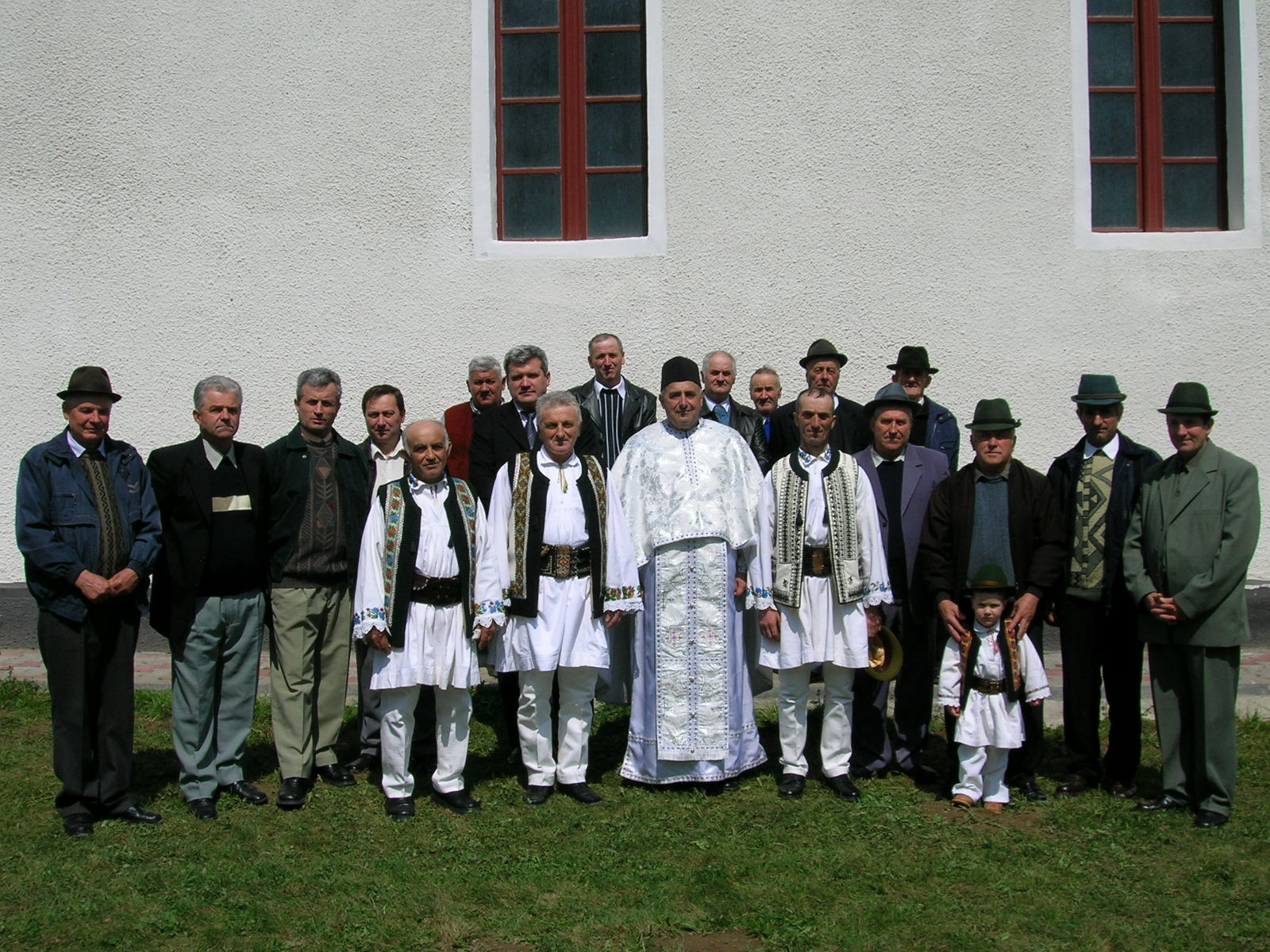 de oblio